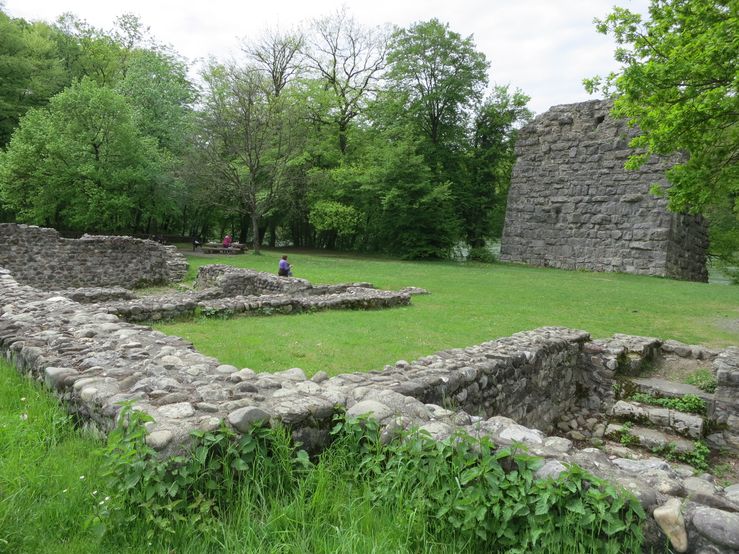 Ruine Freudenau AG, Schweiz